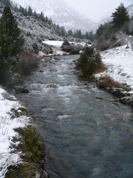 río Aguas Limpias